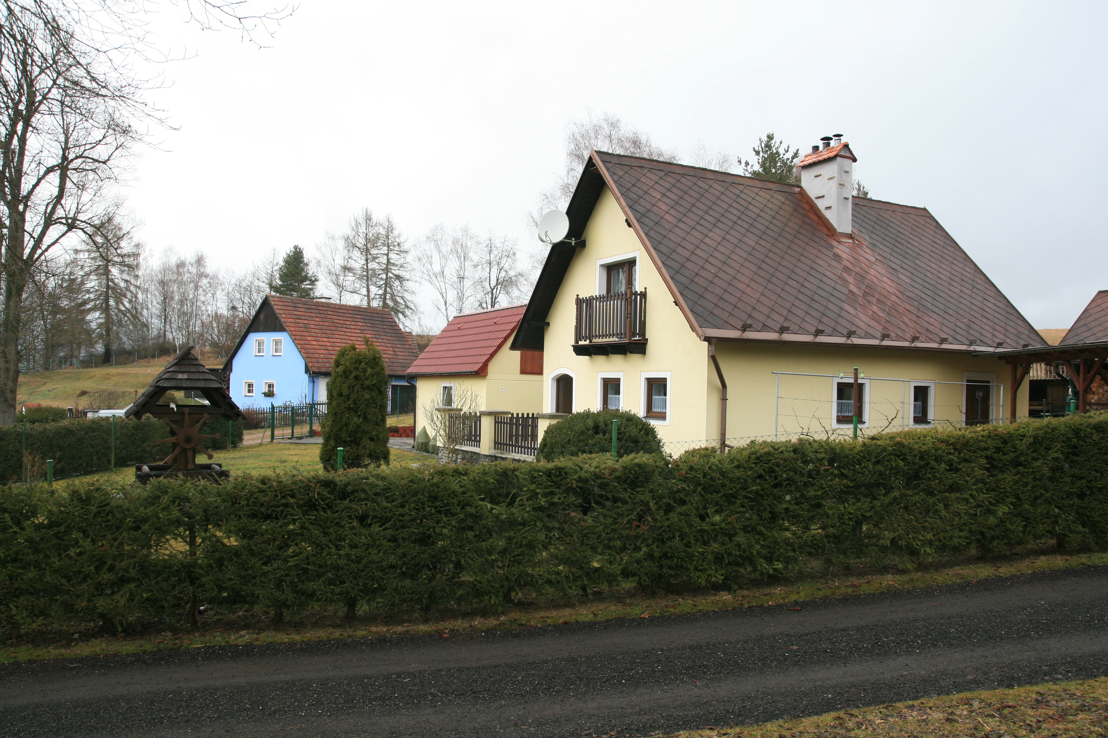 Vesnice Všeměry, část městyse Přídolí v okrese Český Krumlov. Dům u cesty na východním okraji vsi.